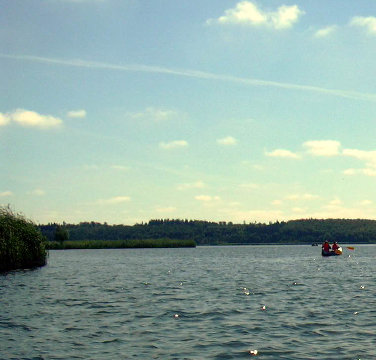 Kanotur på Tystrup Sø en julidag 2005